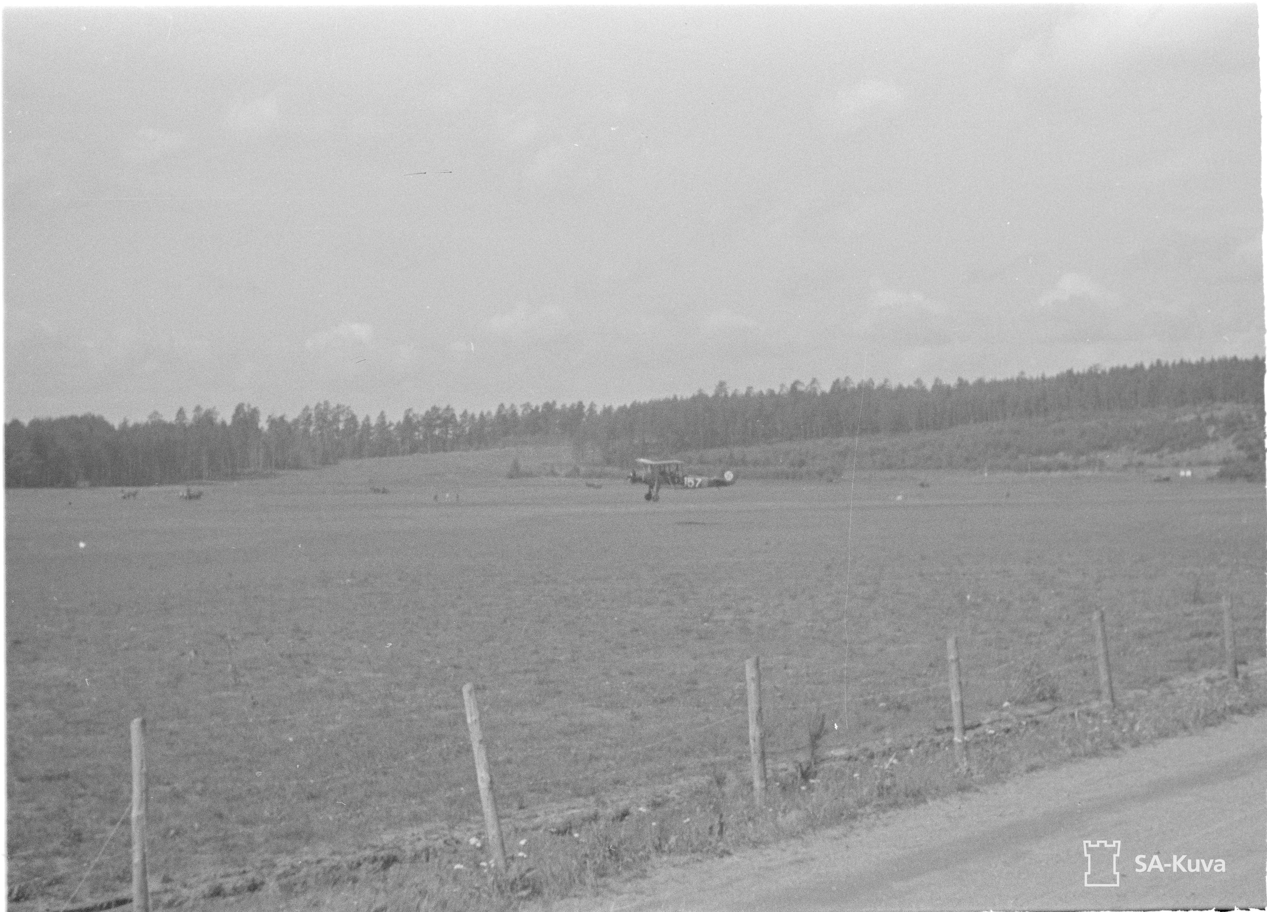 Toimintaa Parolan lentokentällä